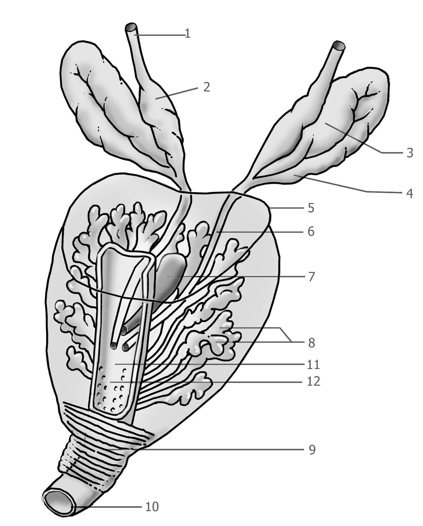 Représentation artistique de la prostate de 3/4 et des vésicules séminales, la vessie a été volontairement retirée et la prostate est translucide pour faciliter l'observation. Descriptif : Conduit déférent Ampoule du conduit déférent Vésicule séminale Conduit excréteur de la vésicule séminale Contour de la prostate Conduit éjaculateur Utricule prostatique Substance glandulaire Sphincter de l'urètre Urètre Colliculus séminal Crête urétrale Auteur : F Lamiot d'après Raziel 25 mai 2006 à 19:03 (CEST) Date de création : 25/05/06) pour contour redessinés. catégorie:appareil reproducteur